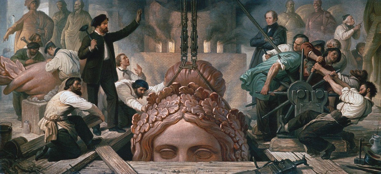 Bavaria statue